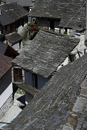 Steindächer in Frasco